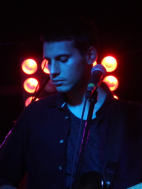 Can Ozan, Antalya konserinden.